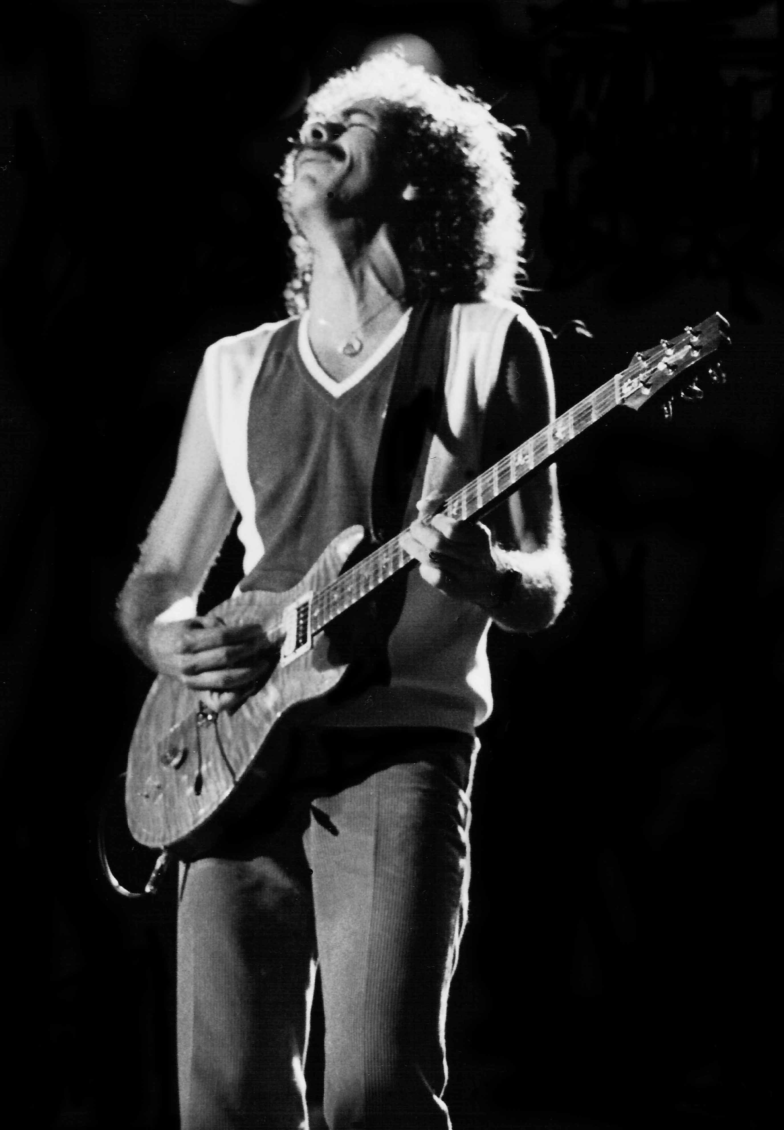 En pleno éxtasis. Barcelona 1984. Camara: Olympus OM2 Objetivo: OM 135mm 2.8 Photographer: F. Antolín Hernandez